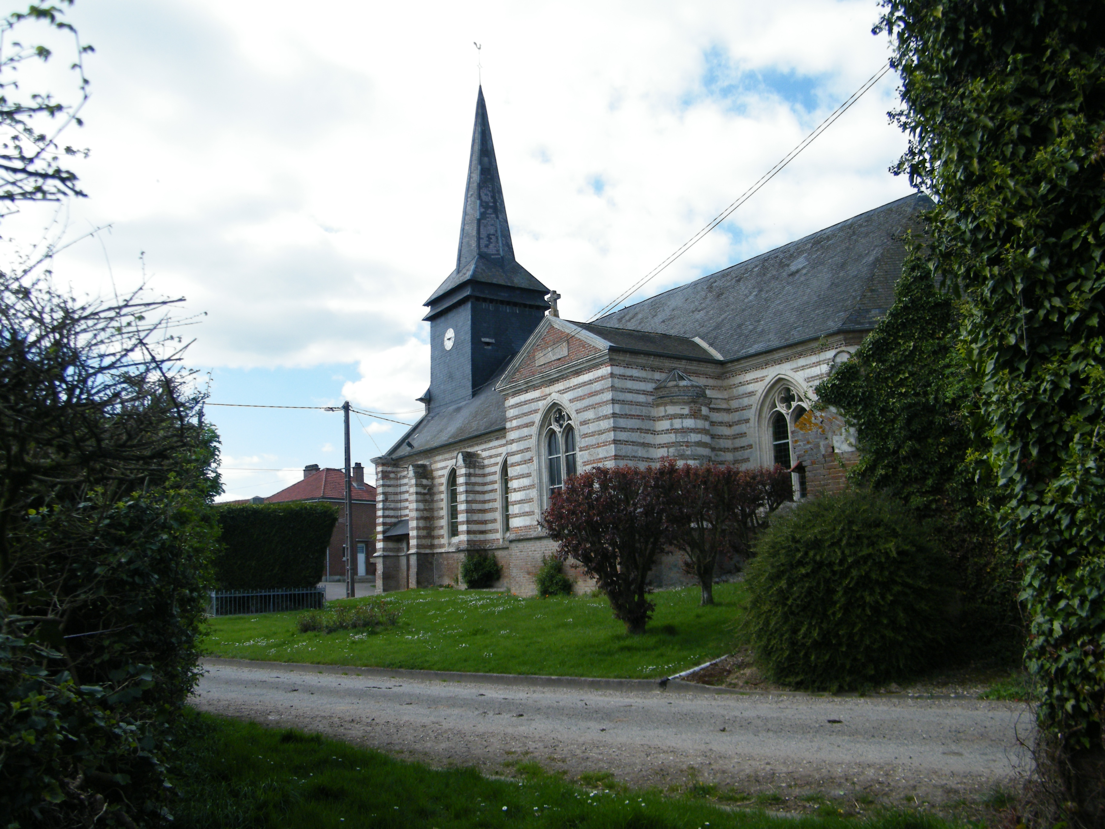 L'église Saint-Gilles, côté sud, Fresneville, Somme, France.